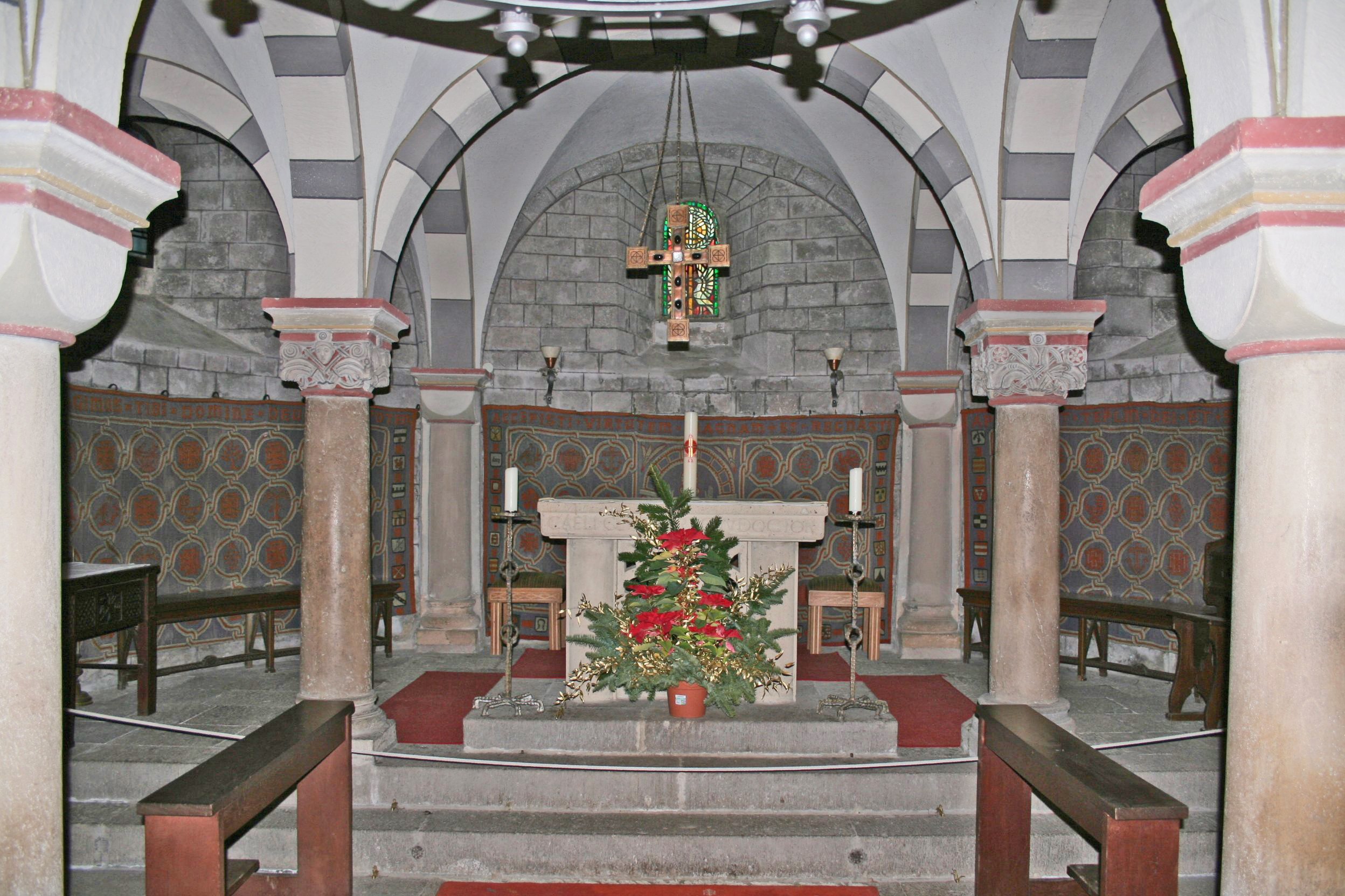 Benediktinerabtei Maria Laach: Krypta vun der Abteikierch Maria Laach.